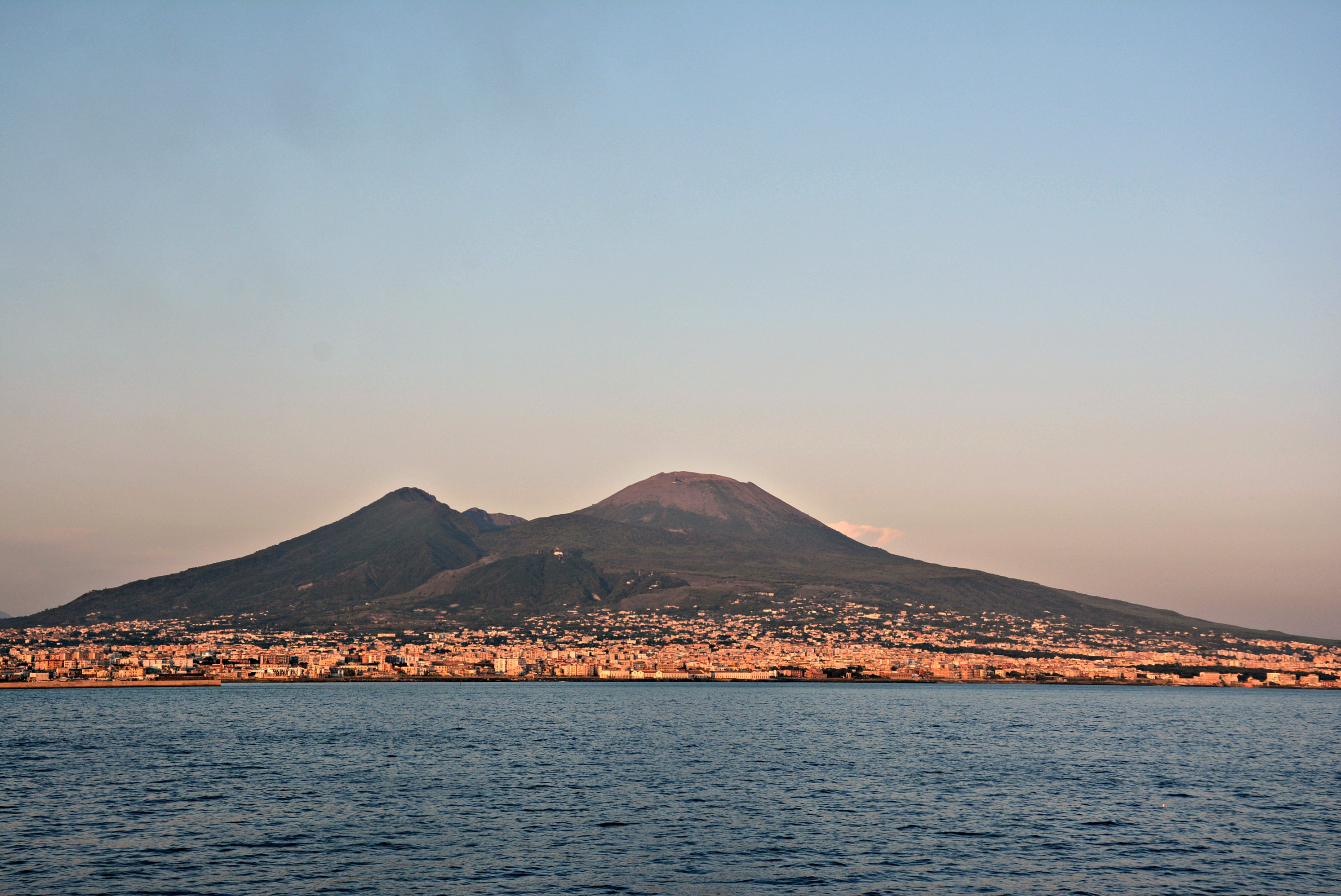 Il Vesuvio visto dal mare